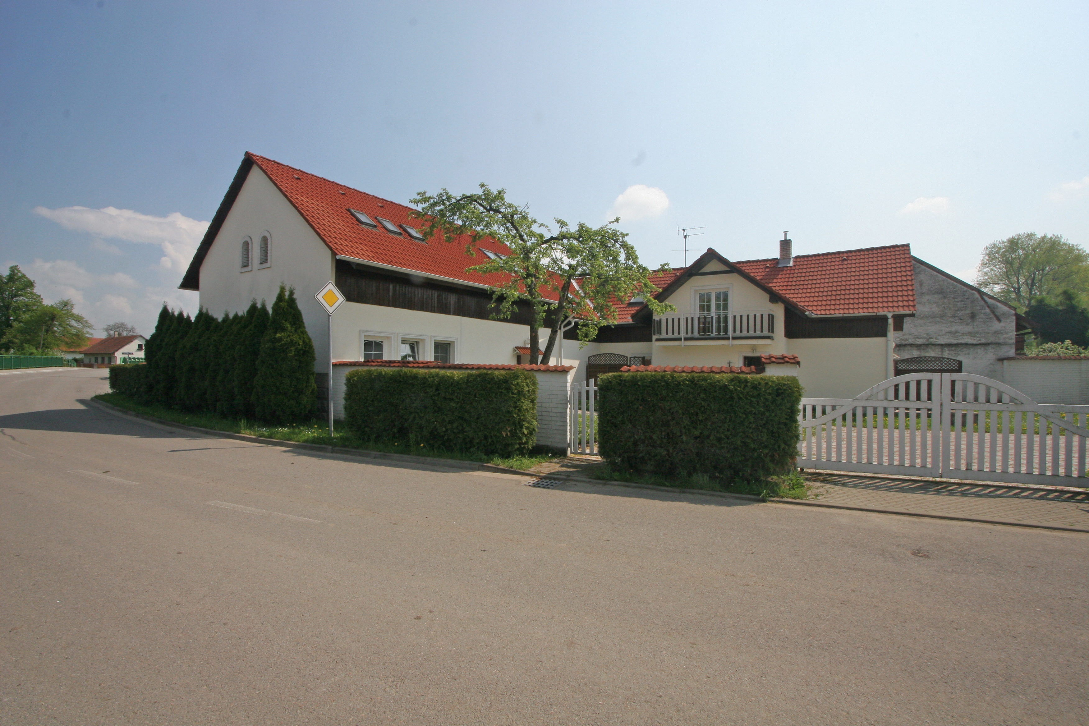 Velké Koloděje čp. 13